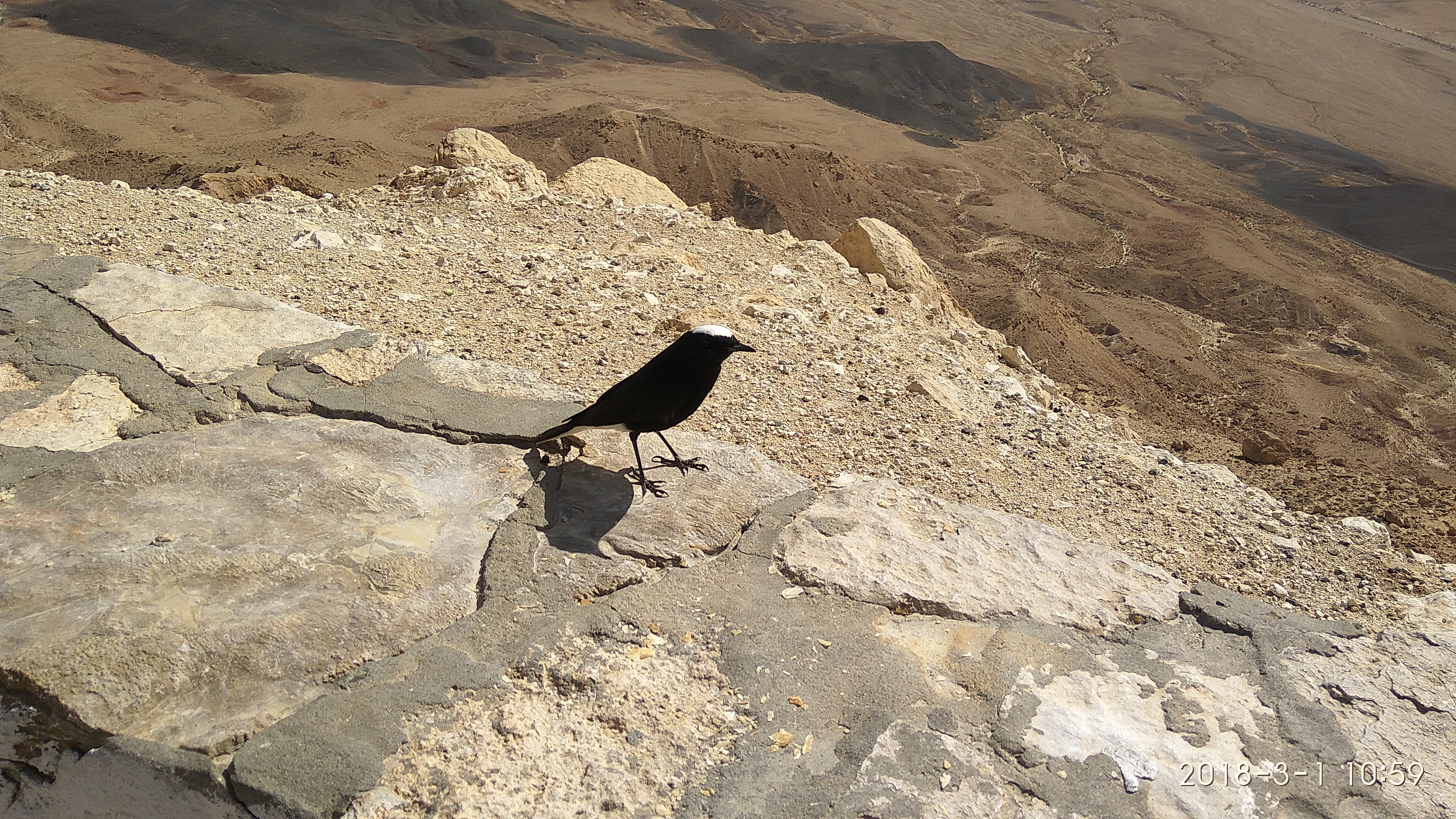 סלעית המדבר, צולם במכתש רמון